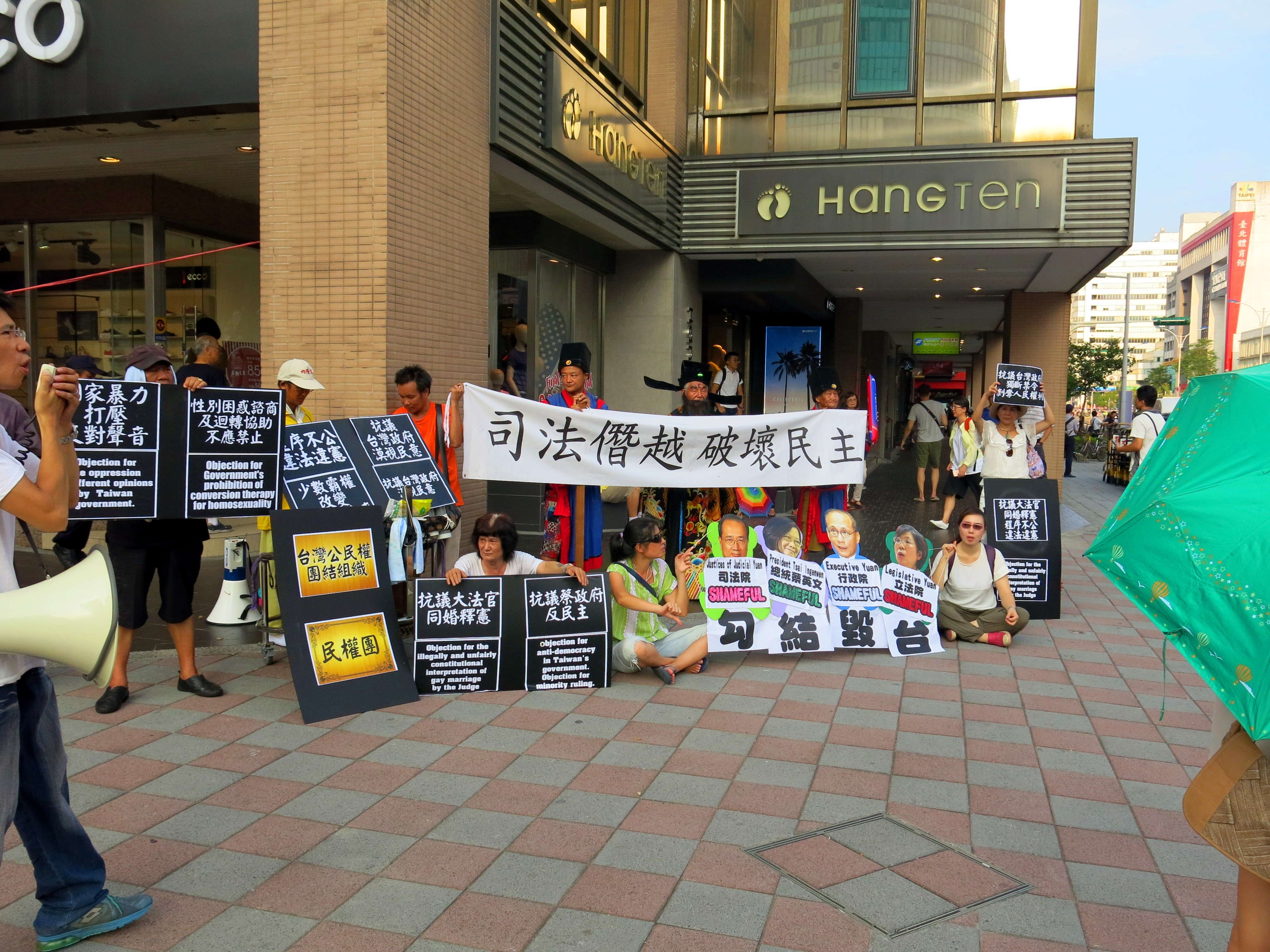 中文（台灣）: 臺北市松山區敦化北路與南京東路四段路口，台灣公民權團結組織（民權團）於第二十九屆夏季世界大學運動會開幕式當天抗議同性婚姻法案。